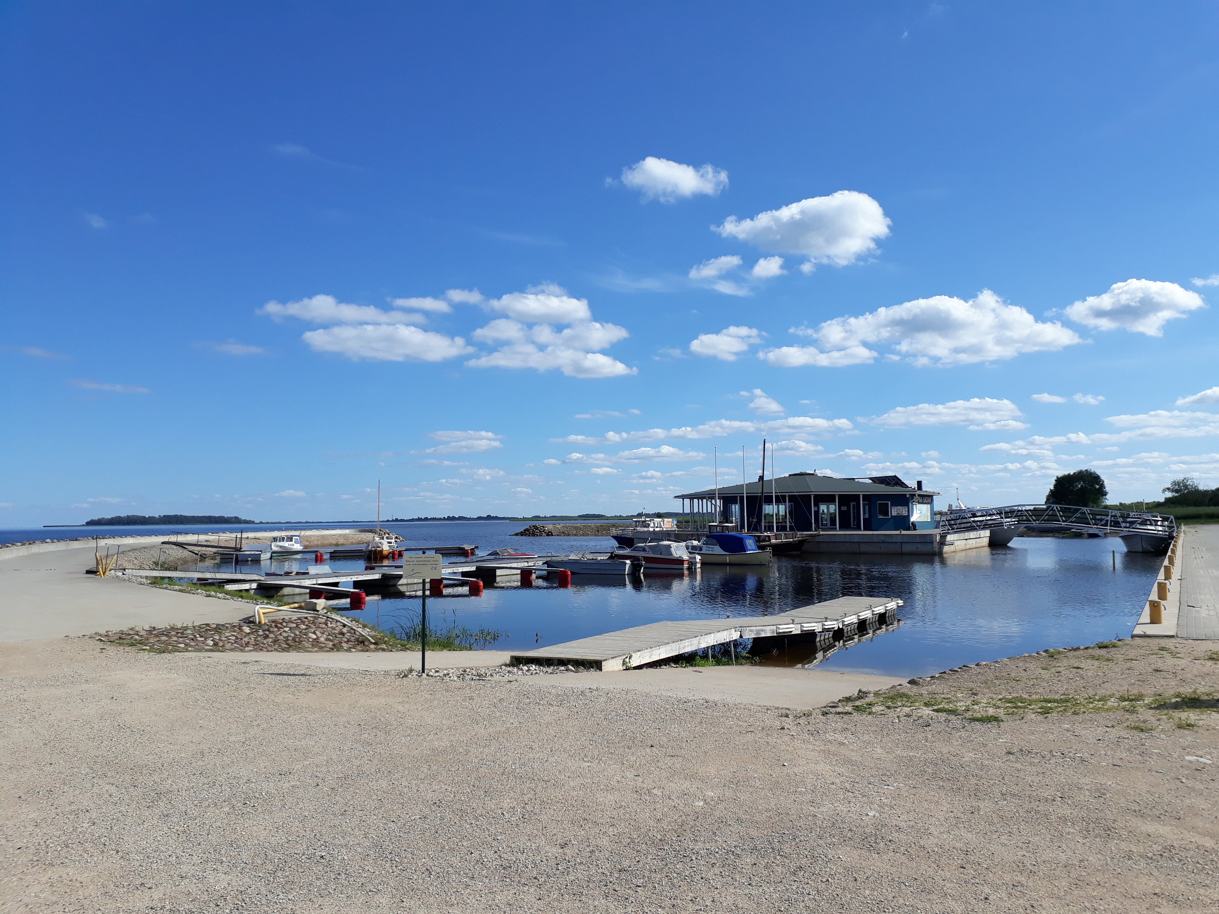 Räpina sadam